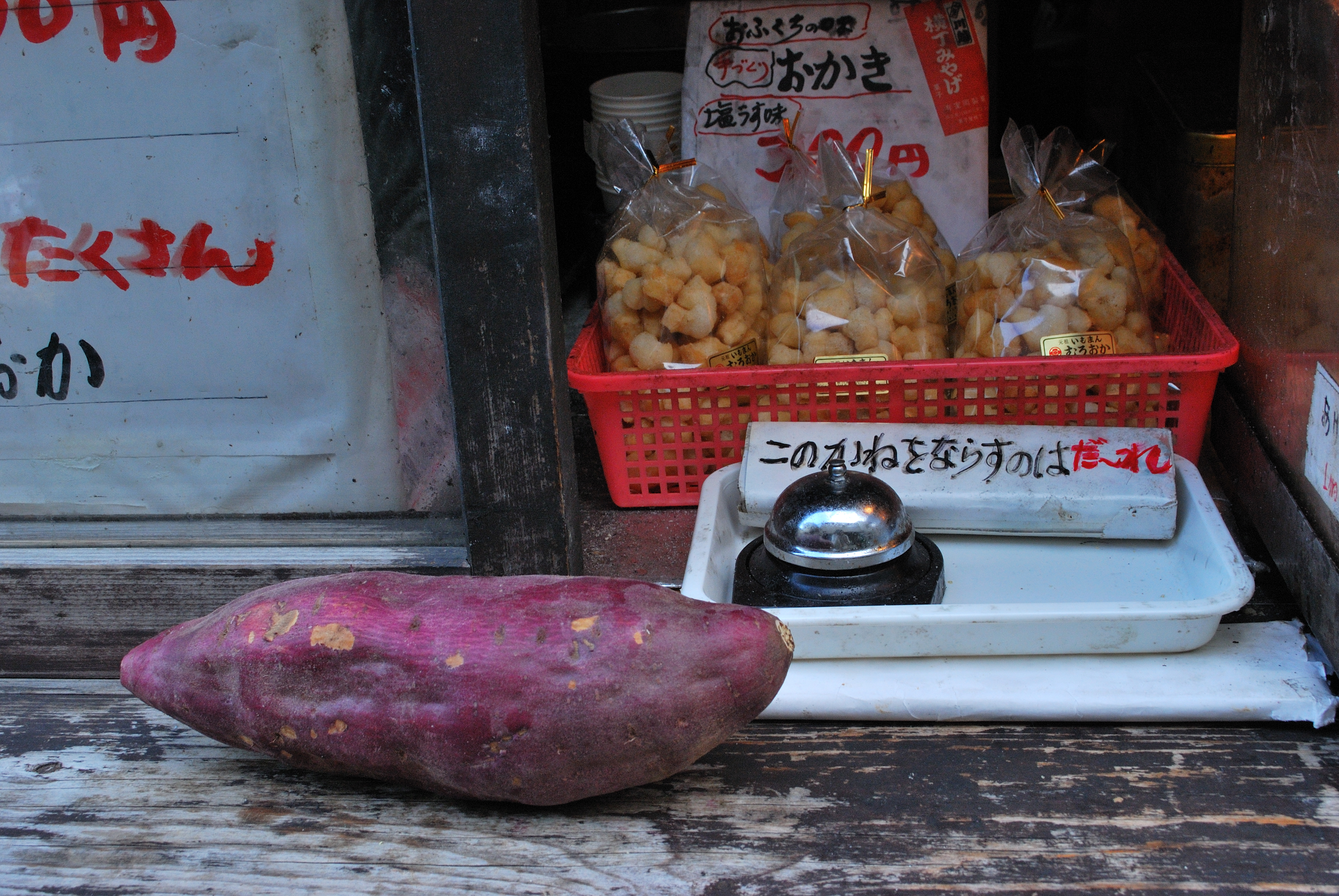 あの鐘を鳴らすのはあなた